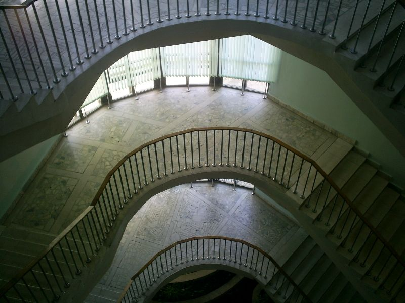 УлГУ — лестницаУльяновкий государственный университет. Лестничные пролеты в главном здании